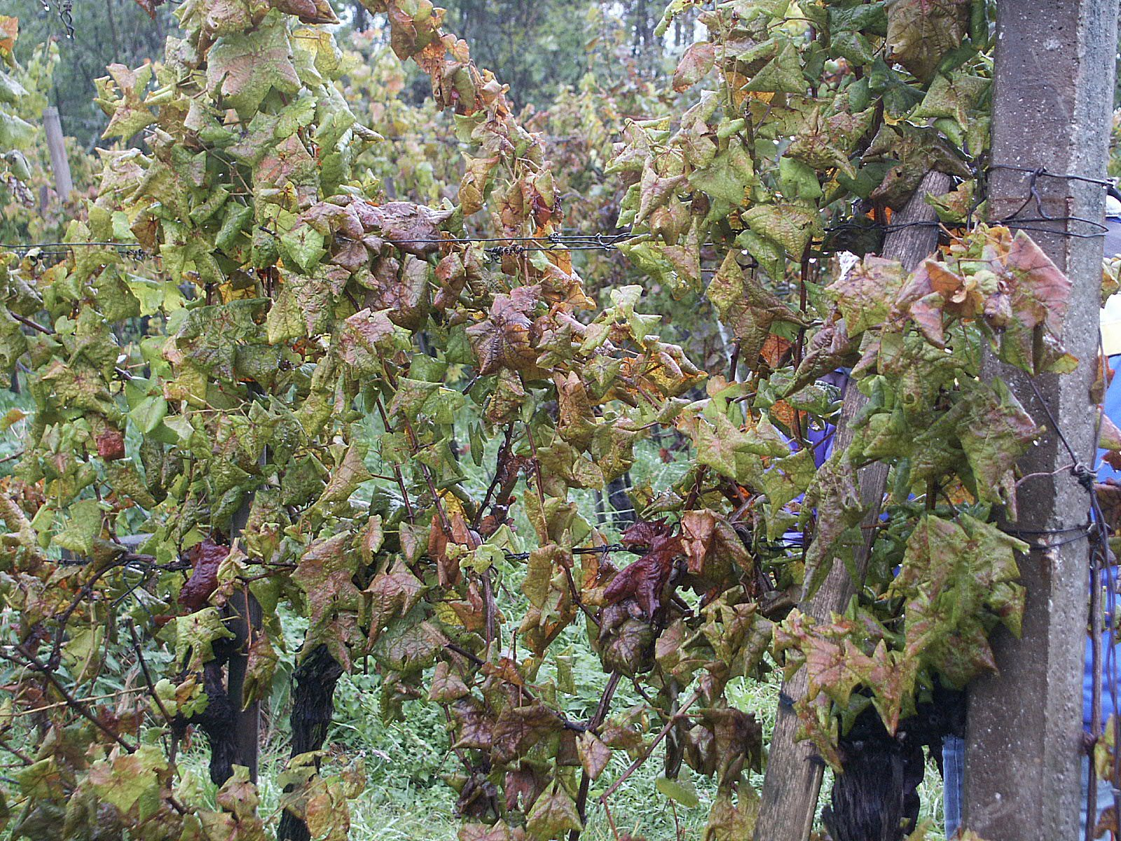 Blattsymptome von Flavescence_dorée (eine Phytoplasmaerkrankung)bei der Sorte Scheurebe